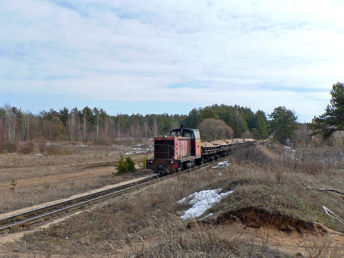 ТУ7-1703 с грузовым поездом следует на завод, УЖД Тверского КСМ №2